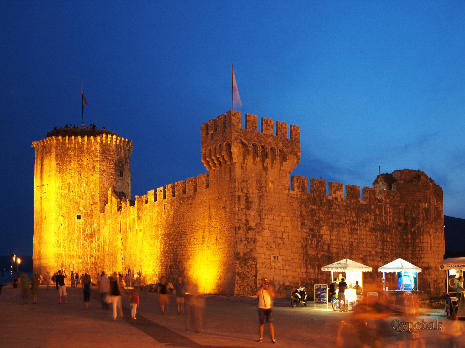 Фортеця Камерленґо